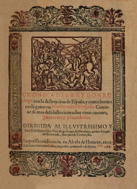 Portada del libro de Pedro de Corral titulado "Crónica del rey don Rodrigo con la destruyción de España" (o Crónica sarracina), en su edición de 1587 publicada en Alcalá de Henares.